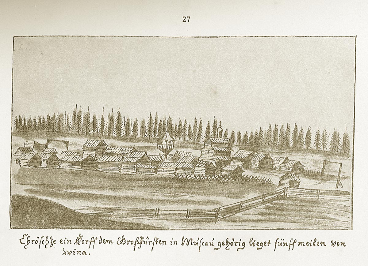 Крестцы